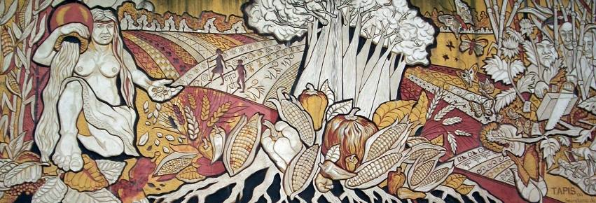 Mural FCAyF - UNLP